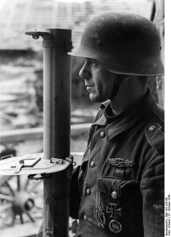 Westfront, bei Metz, Grenadier mit Panzerschreck Prop.Kp WKBA. Potsdam, Film-Nr.: 457/6a, Bildberichter: Schürer, Ort: Machern b./Metz, Datum 27.10.44 Text: Kampf um Machern Ein Grenadier, der sich im Kampf um Machern auszeichnete, mit dem Panzerschreck. Scherl Bilderdienst Nahkämpfer mit dem Panzerschreck. Ein deutscher Grenadier [Obergefreiter], der sich bei den Abwehr-kämpfen in Lothringen besonders auszeichnete. Verwundetenabzeichen, Infanteriesturmabzeichen und EK I sind die Zeugen zahlloser Kämpfe, die er erfolgreich bestand. PK-Aufnahme: Schürer 1011.44 [Herausgabedatum]